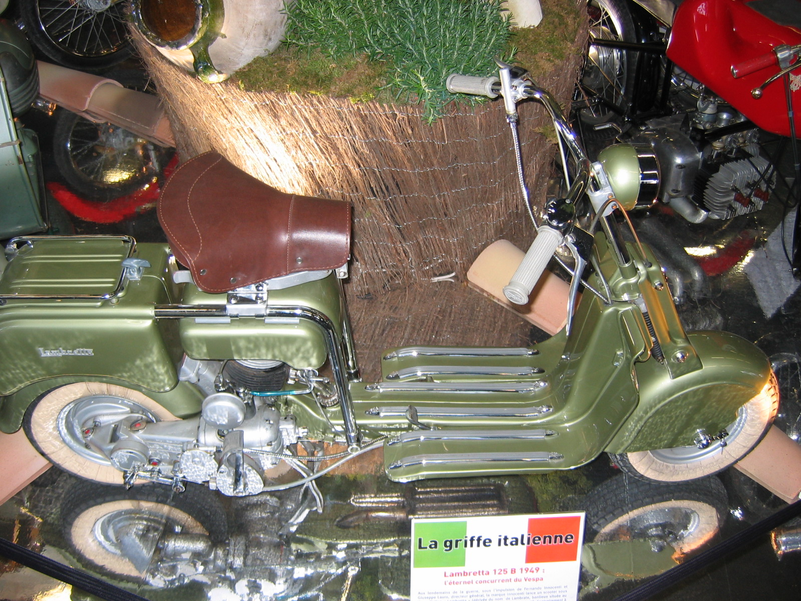 Italian scooter Lambretta 125, model B, 1949